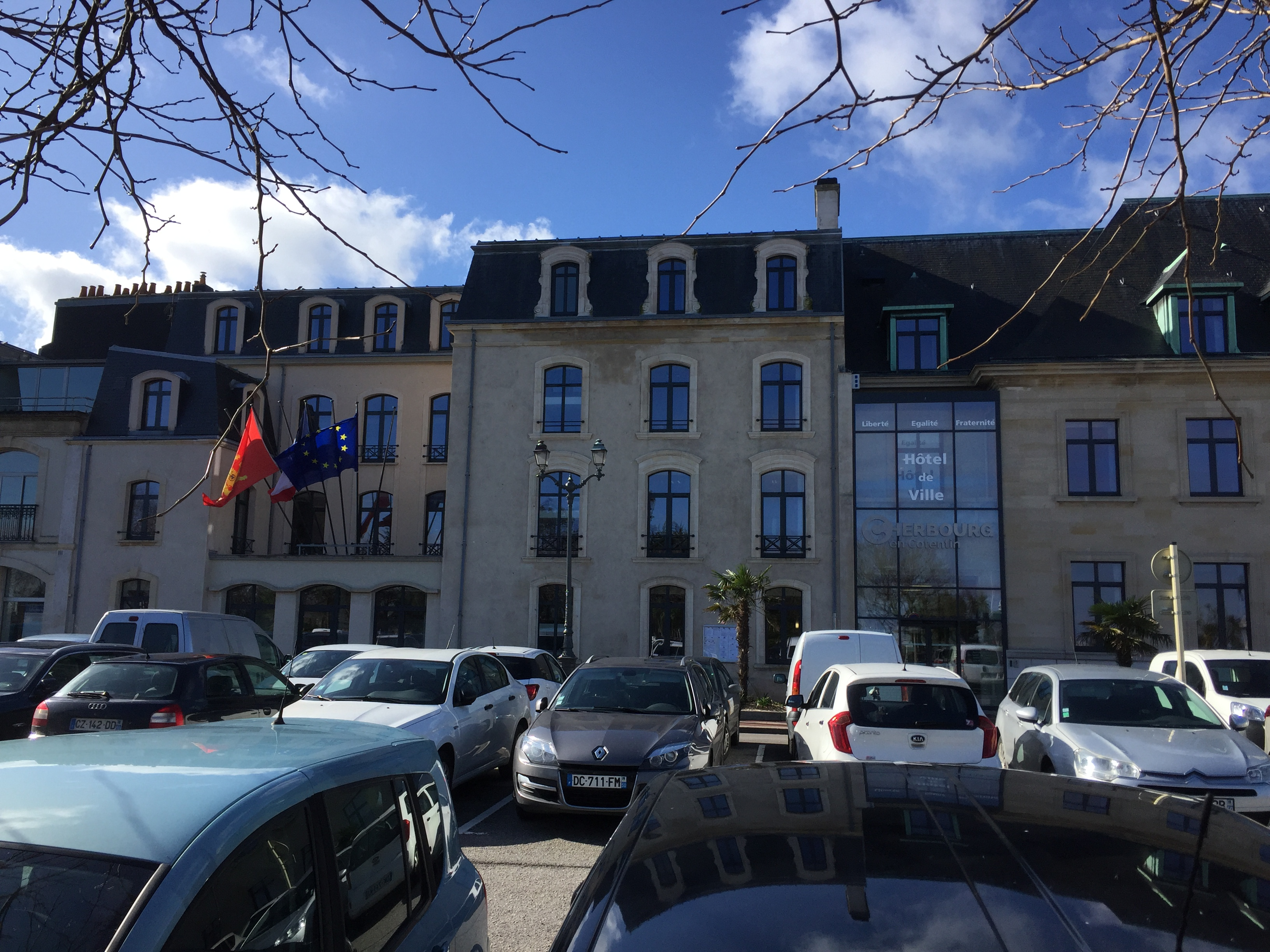 Mairie de Cherbourg-en-Cotentin